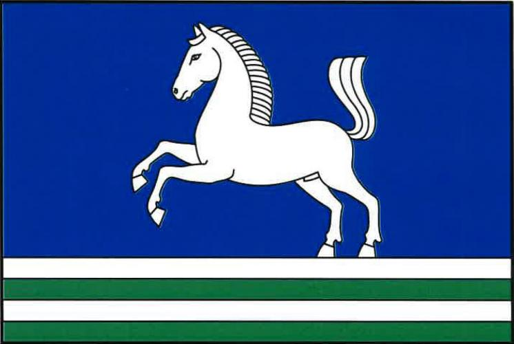 Hejnice, okres Ústí nad Orlicí, vlajka